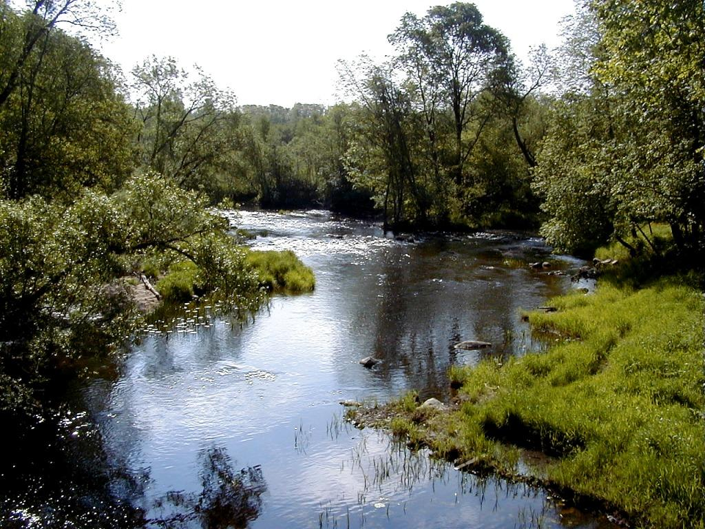 Mazā jugla pie Kranciema 1999-05-30